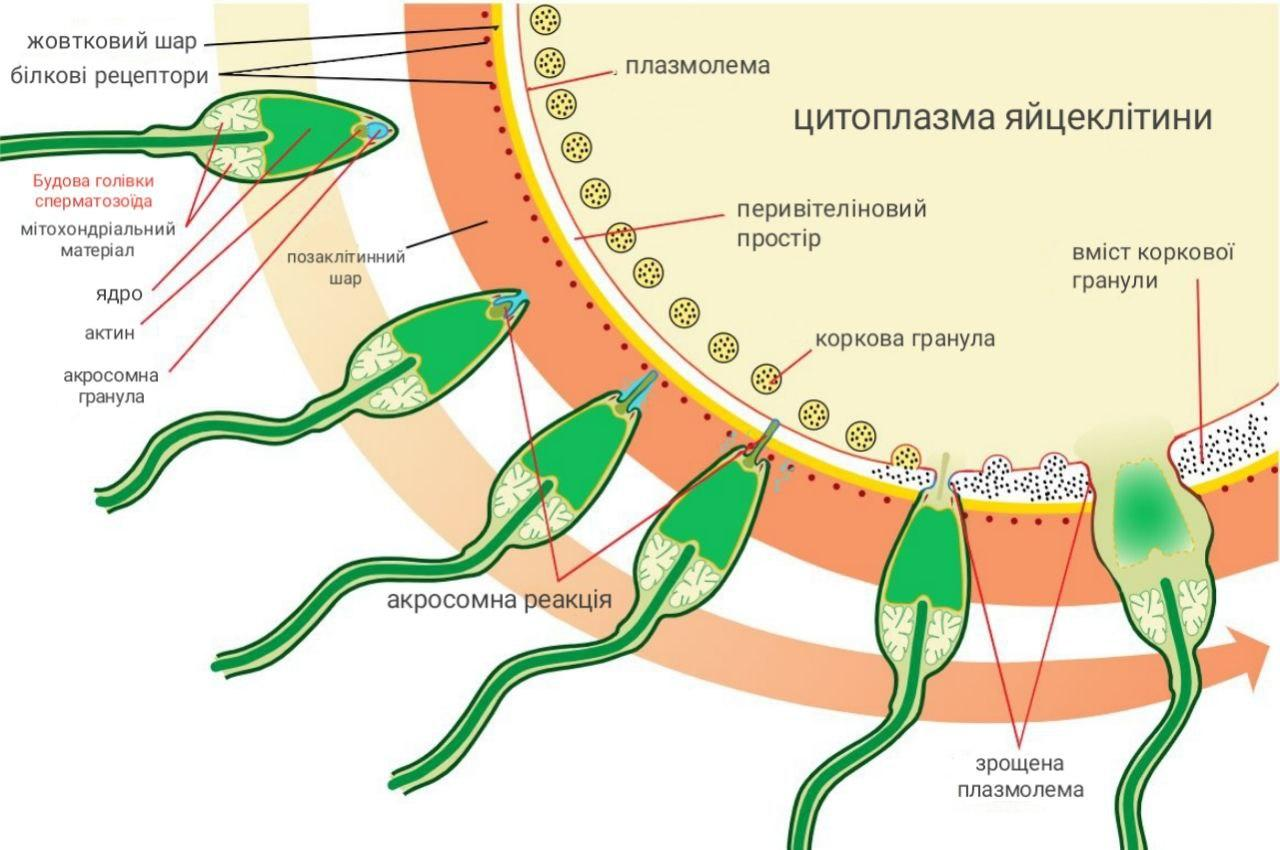 Український переклад схеми з англійської Вікіпедії